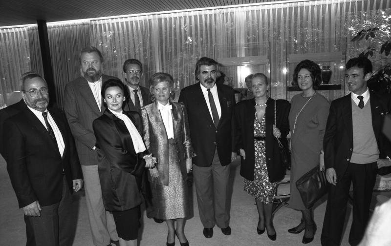 14.10.1987 Hannelore Kohl, Vorsitzende des Kuratoriums Zentralnervensystem, zu dessen Gunsten die Bonner Oper am 15.10. einen Gala-Abend als Benefiz-Konzert veranstaltet, empfängt die beteiligten Künstler und den Generalintendanten der Bonner Oper, Jean-Claude Riber, im Kanzlerbungalow